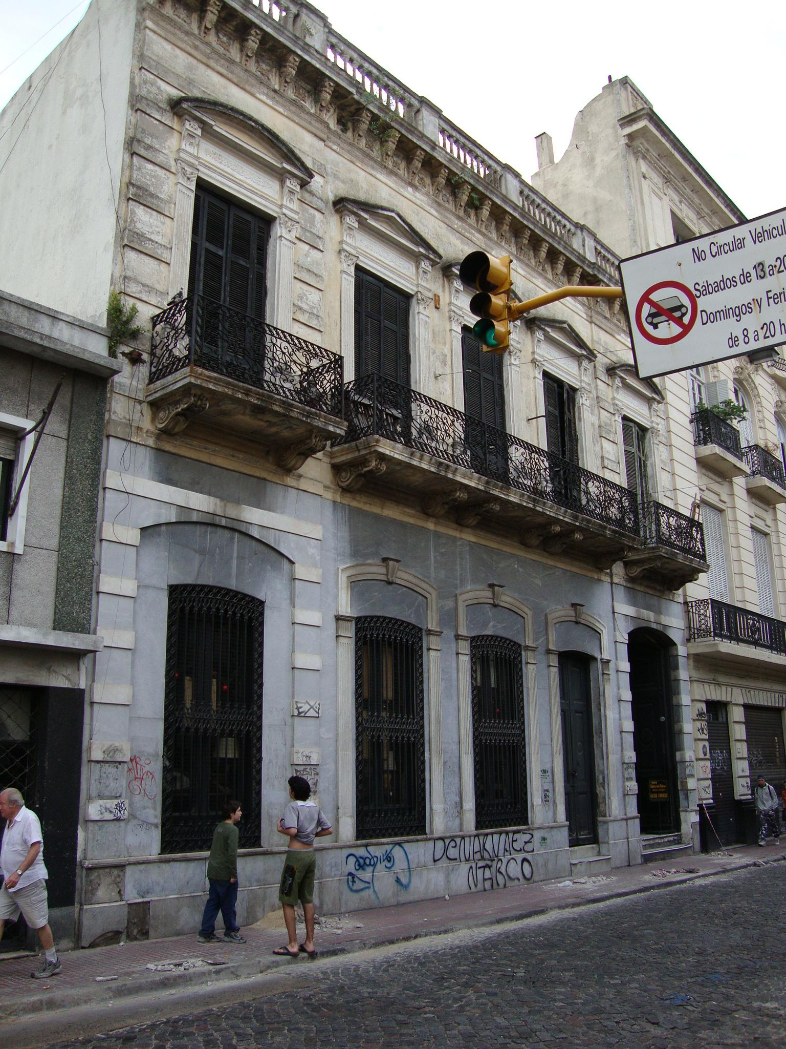 Antigua casa de la familia Ezeiza, en la calle Defensa nº 1179. Construida en 1876, hoy es el Pasaje de la Defensa.